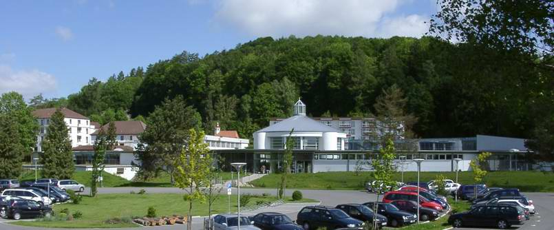 Jordanbad Biberach an der Riß von Benutzer:Enslin selbst fotografiert am 23.5.2004. Bild ist unter der GNU FDL zur weiteren Verwendung freigegeben